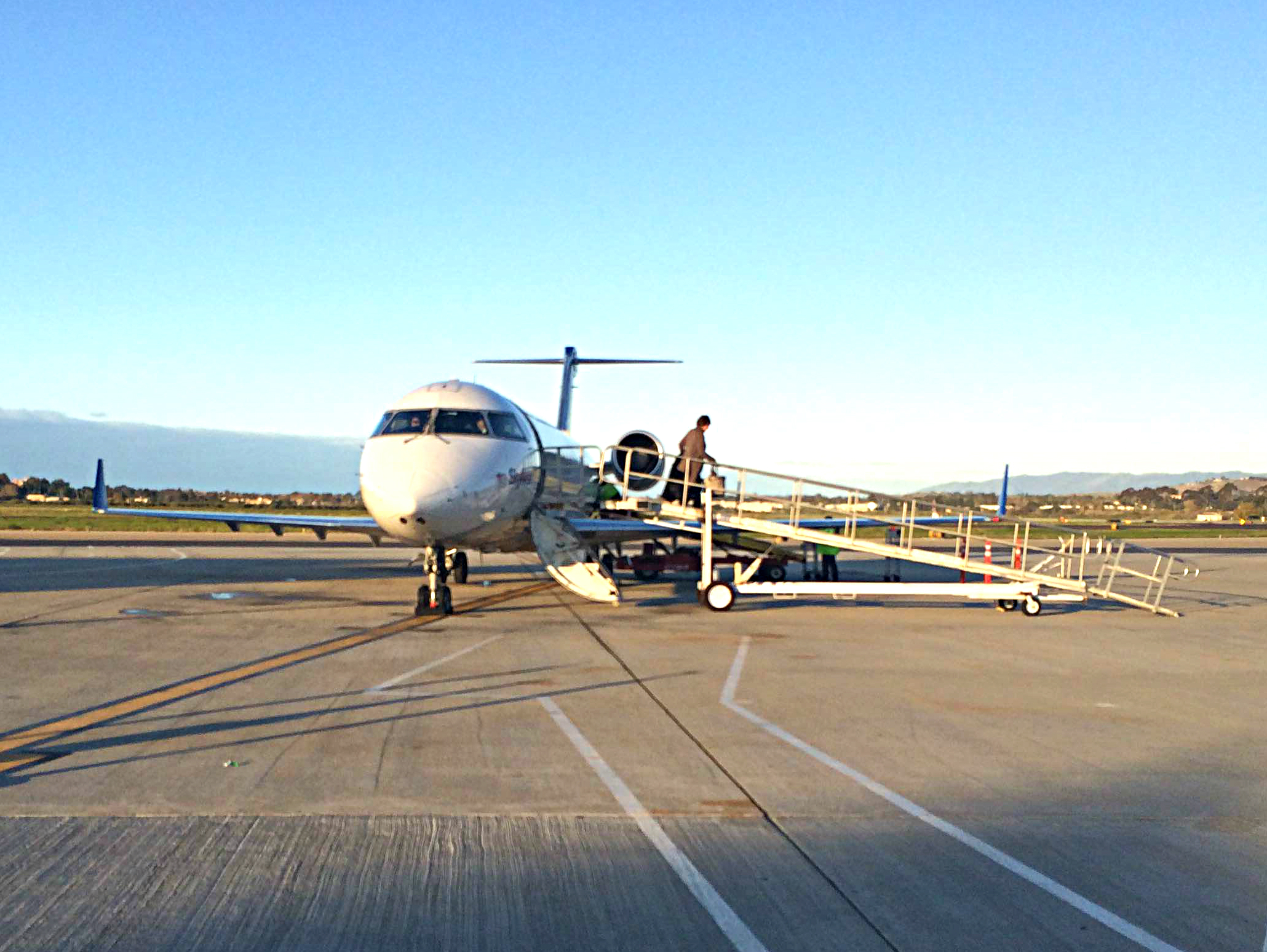 United Airlines at SBA